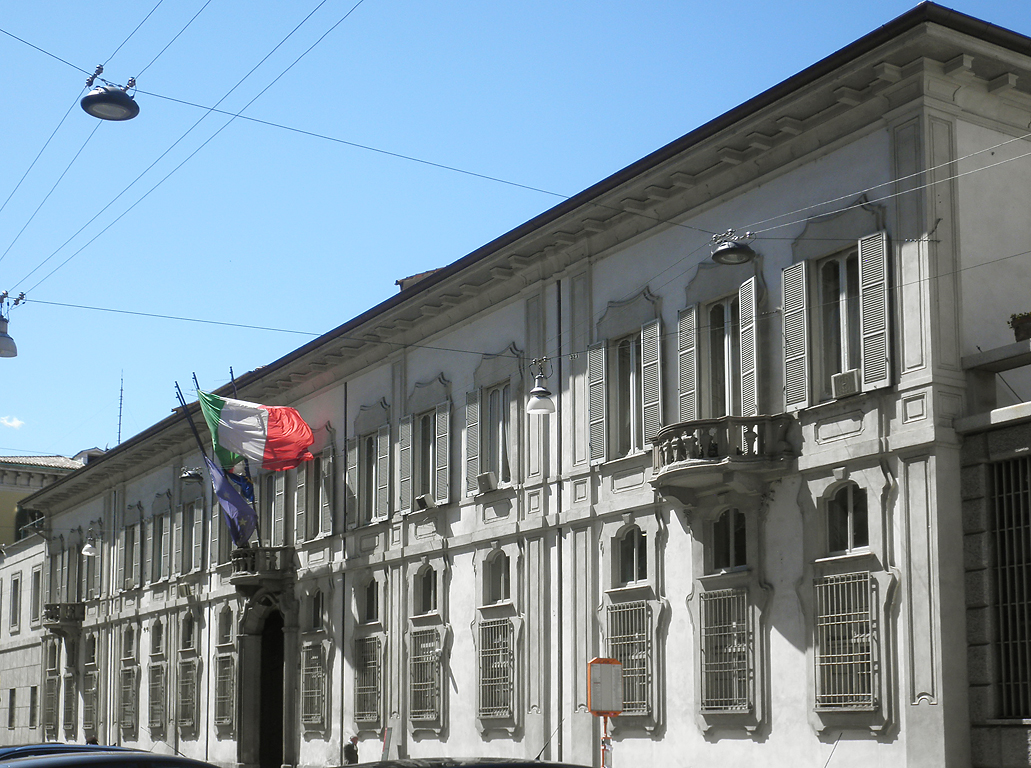 Palazzo Isimbardi in corso Monforte 35 a Milano, poi sede dell'Amministrazione Provinciale e ora della Città Metropolitana.